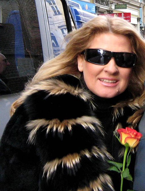 Beata Kozidrak (ur. 4 maja 1960 w Lublinie) - polska piosenkarka